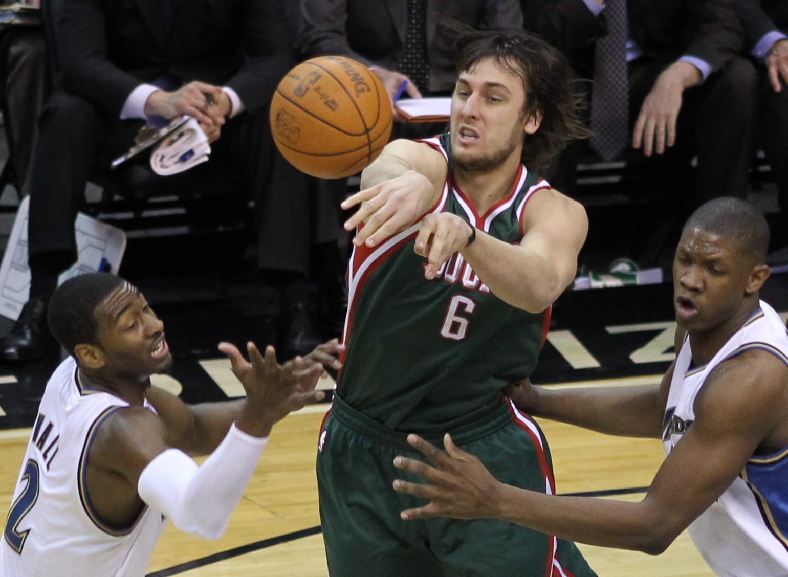 Wizards v/s Bucks 03/08/11